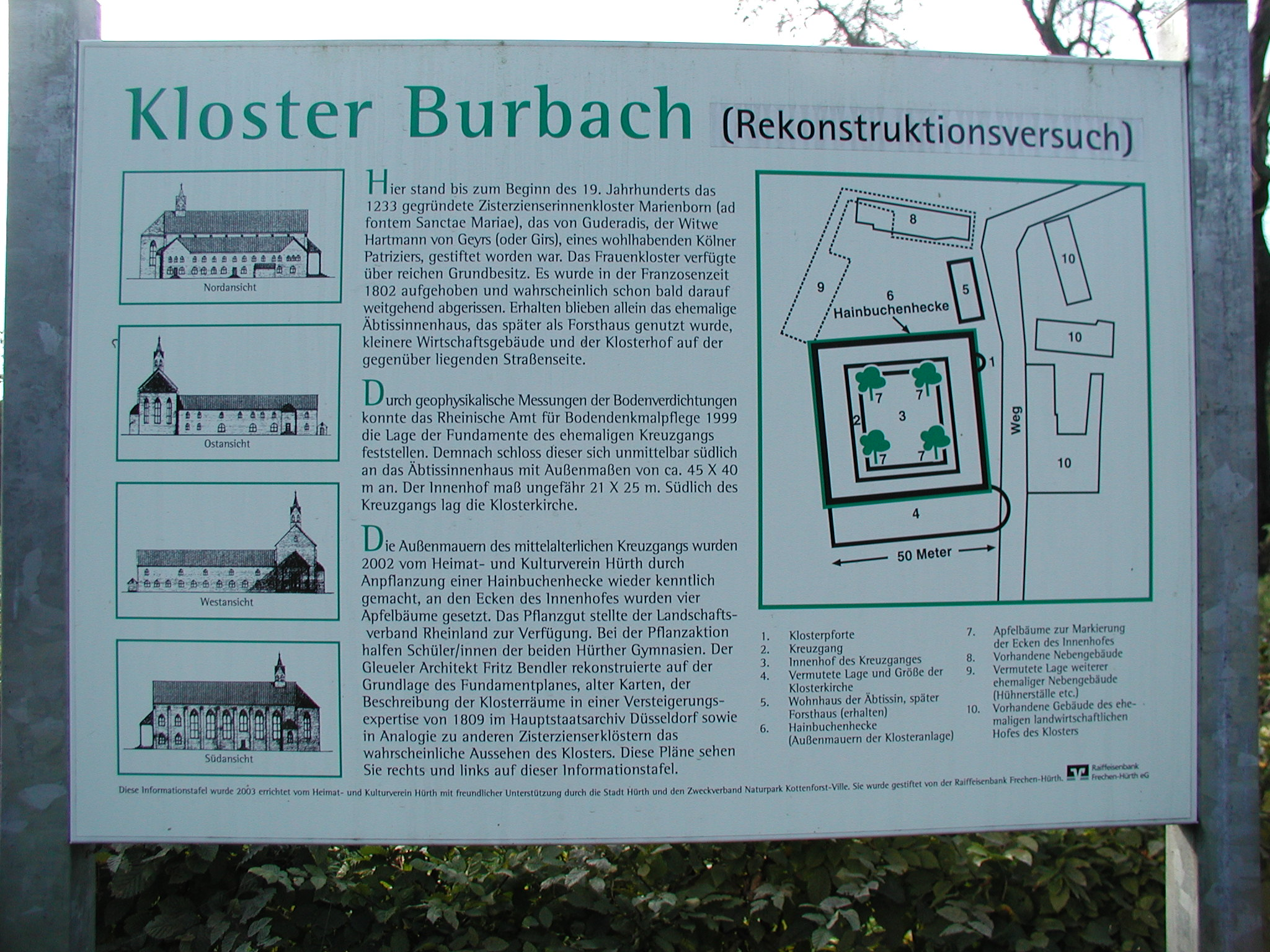 Hürth-Burbach, Kloster Marienborn